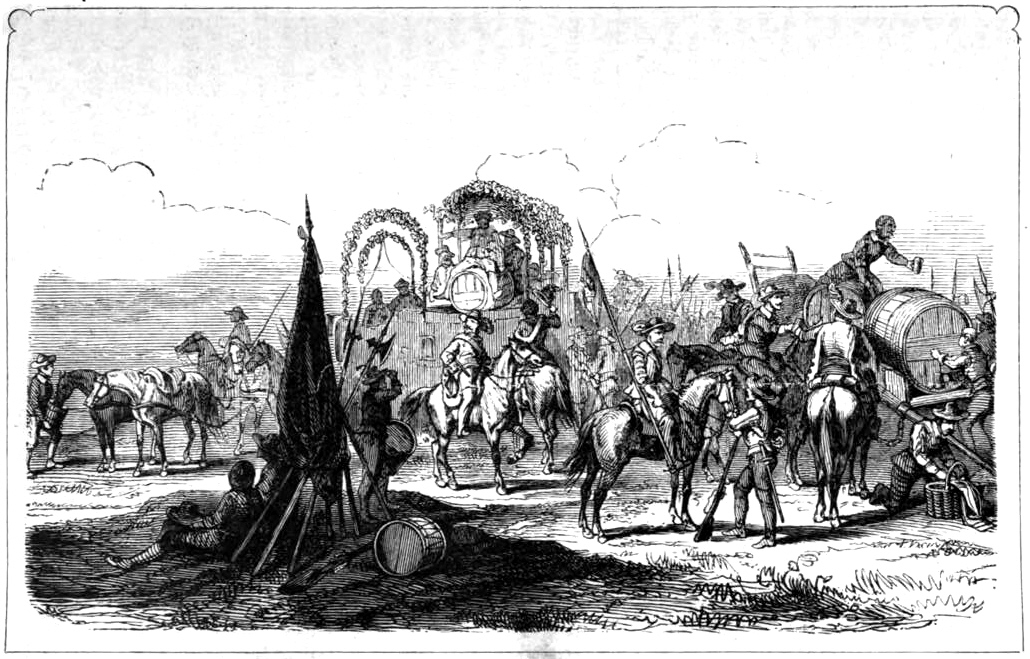 Scene aus dem Düsseldorfer Künstlerfest: Bivouak des Prinzen Rebensaft